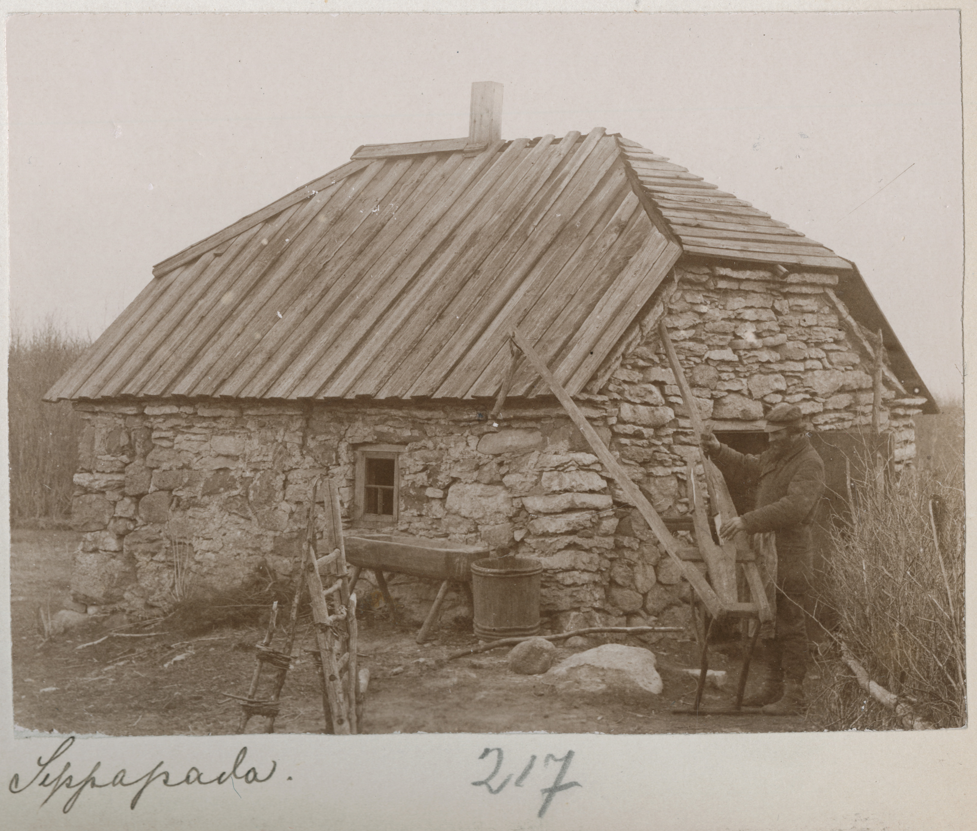 Sepikoda